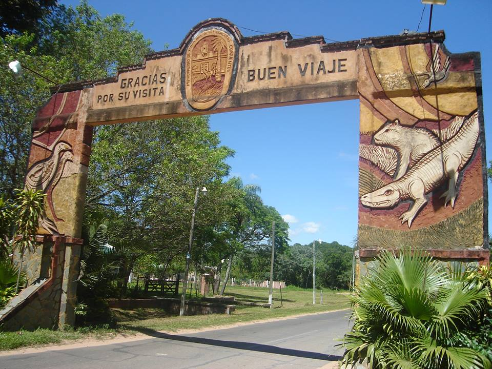 Portal o arco de entrada a Santa Ana de los Guácaras, Argentina.